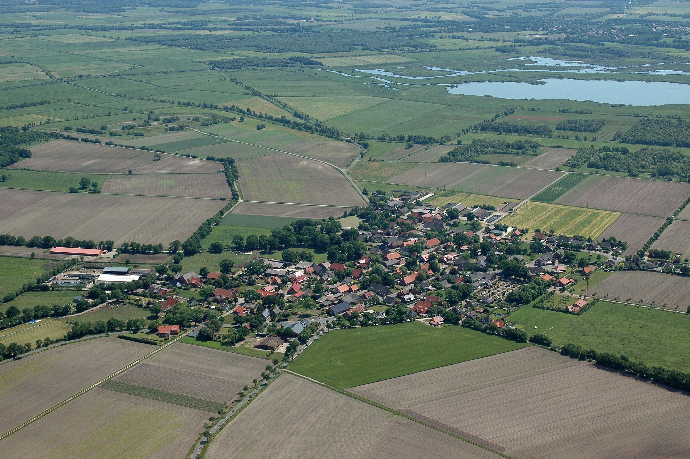 Luftbild von Bramel. Fotoflug vom Flugplatz Nordholz-Spieka über Cuxhaven und Wilhelmshaven